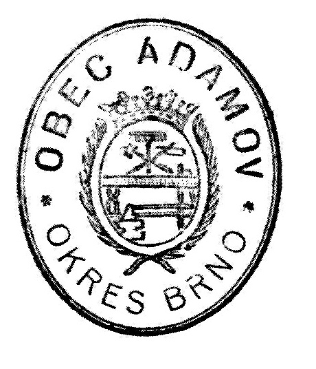 Znak Adamova a adamovských železáren používaný společně v letech 1749 až cca 1971 (z počátku bez okolního textu)